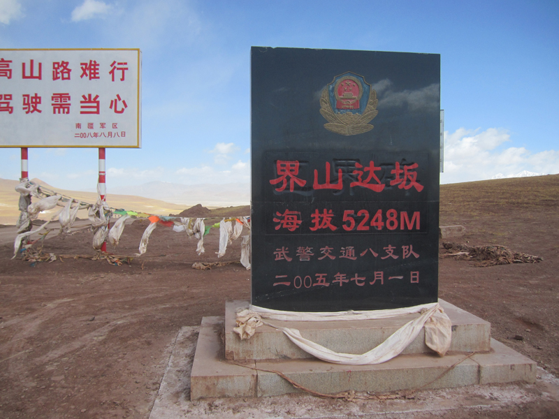 界山达坂上新藏公路旁的石碑。此碑历经多次改变，这是2009年6月23日的样子。